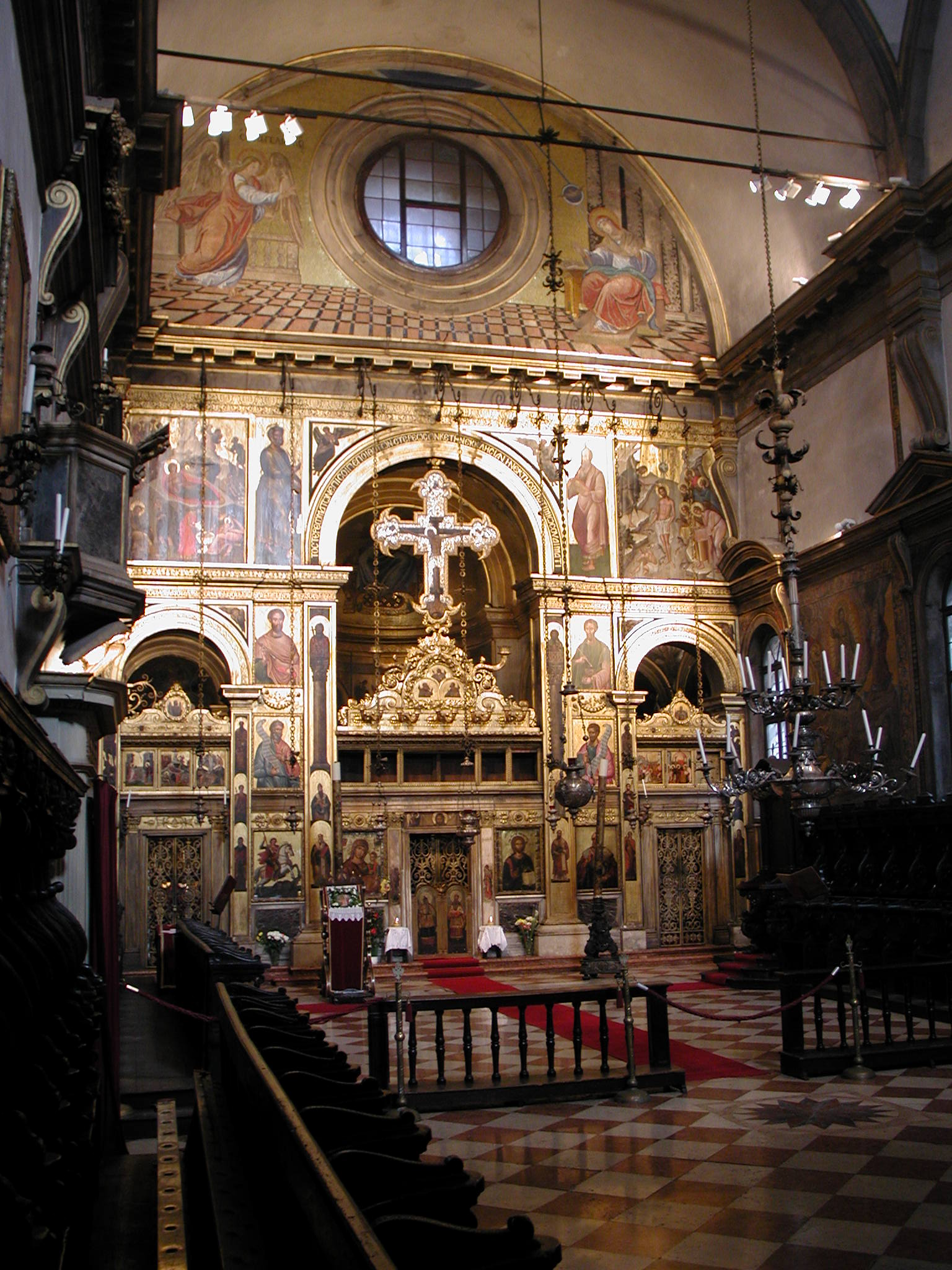 La chiesa greco-ortodossa di San Giorgio dei Greci a Venezia. The orthodox Church of "St George of Greeks", Venice.